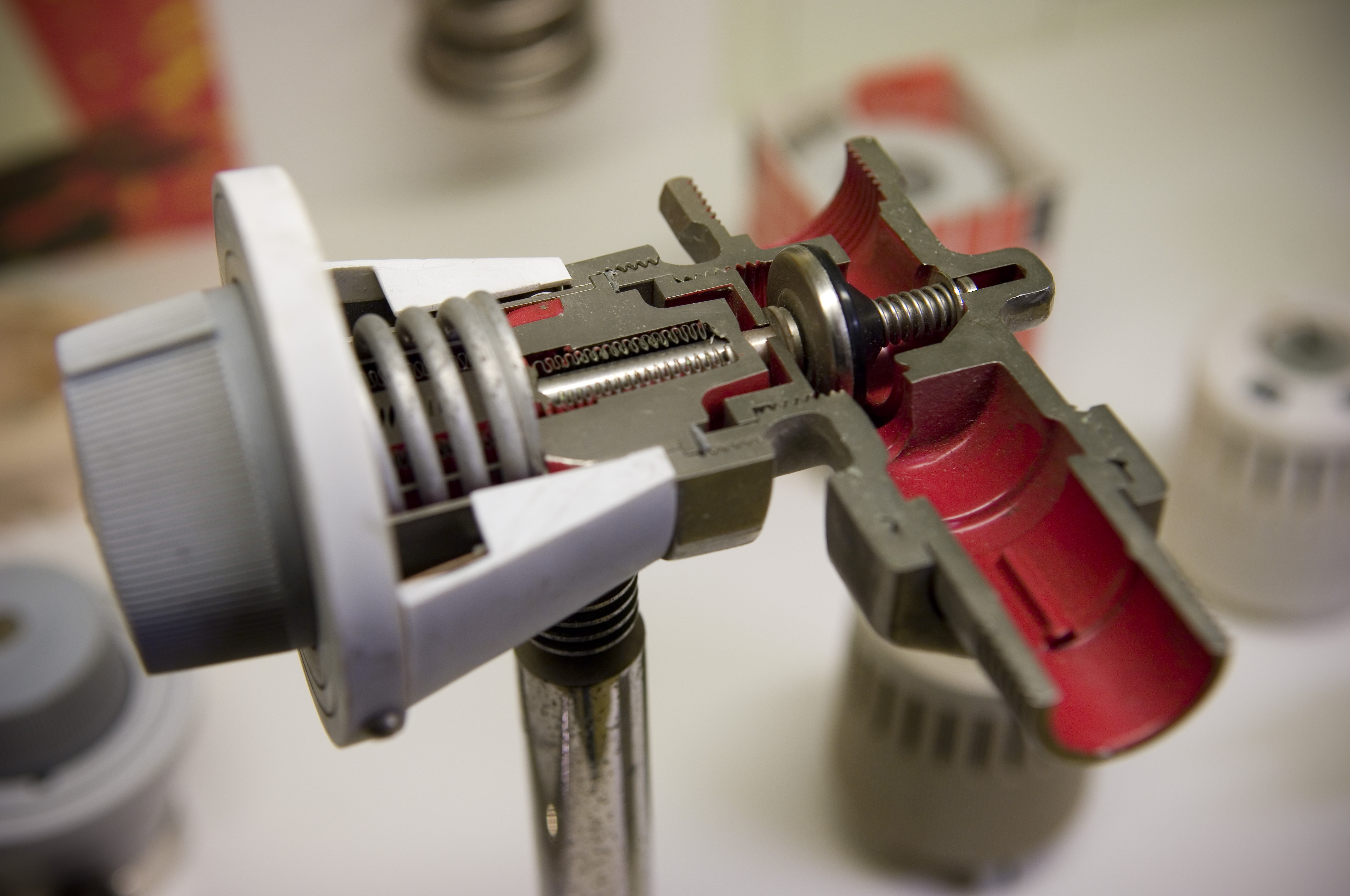 En termostat fra udstillingen om Danfoss’ første og vigtigste produkter i Danfoss Universe.